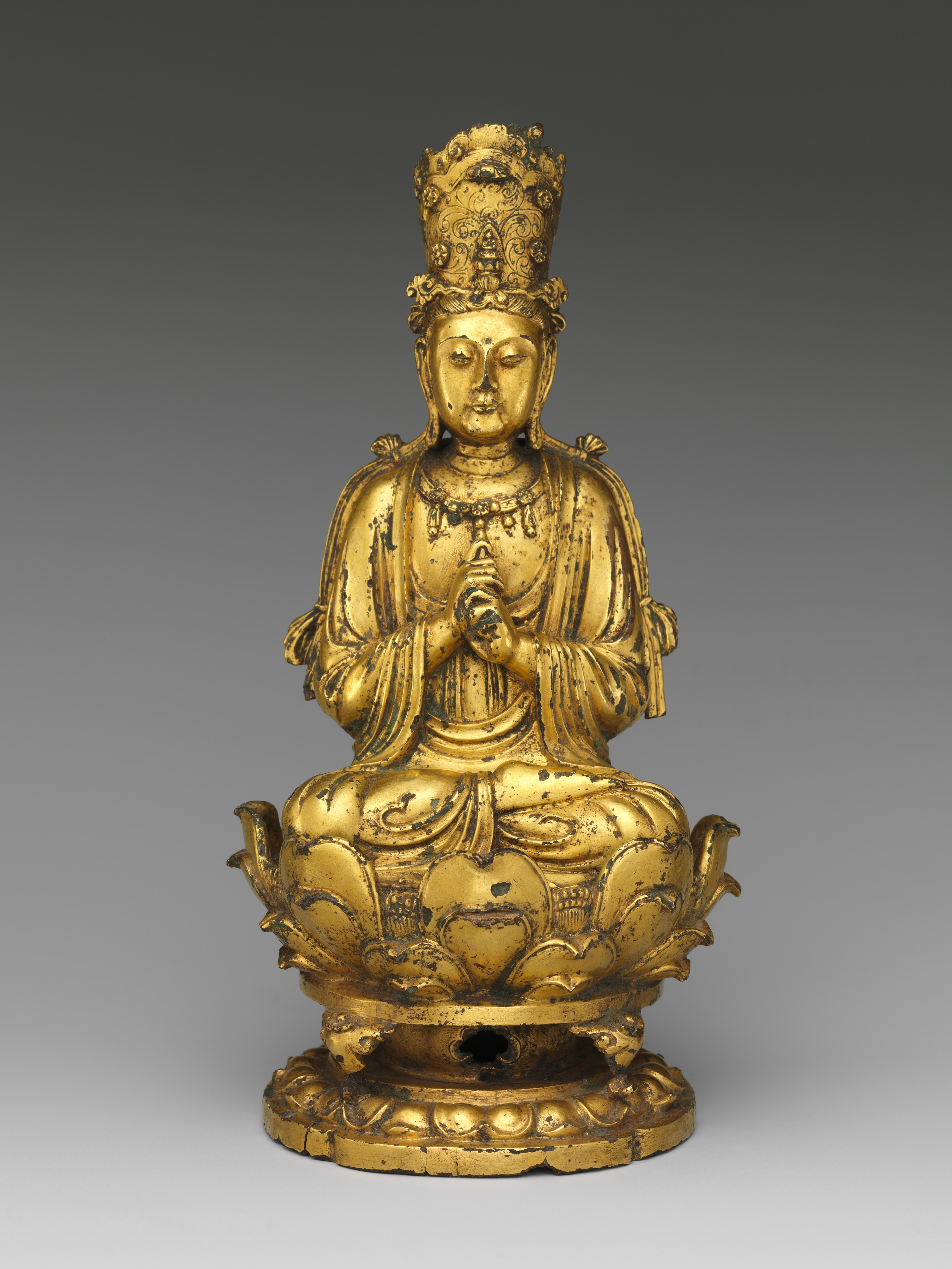 China; Figure; Sculpture